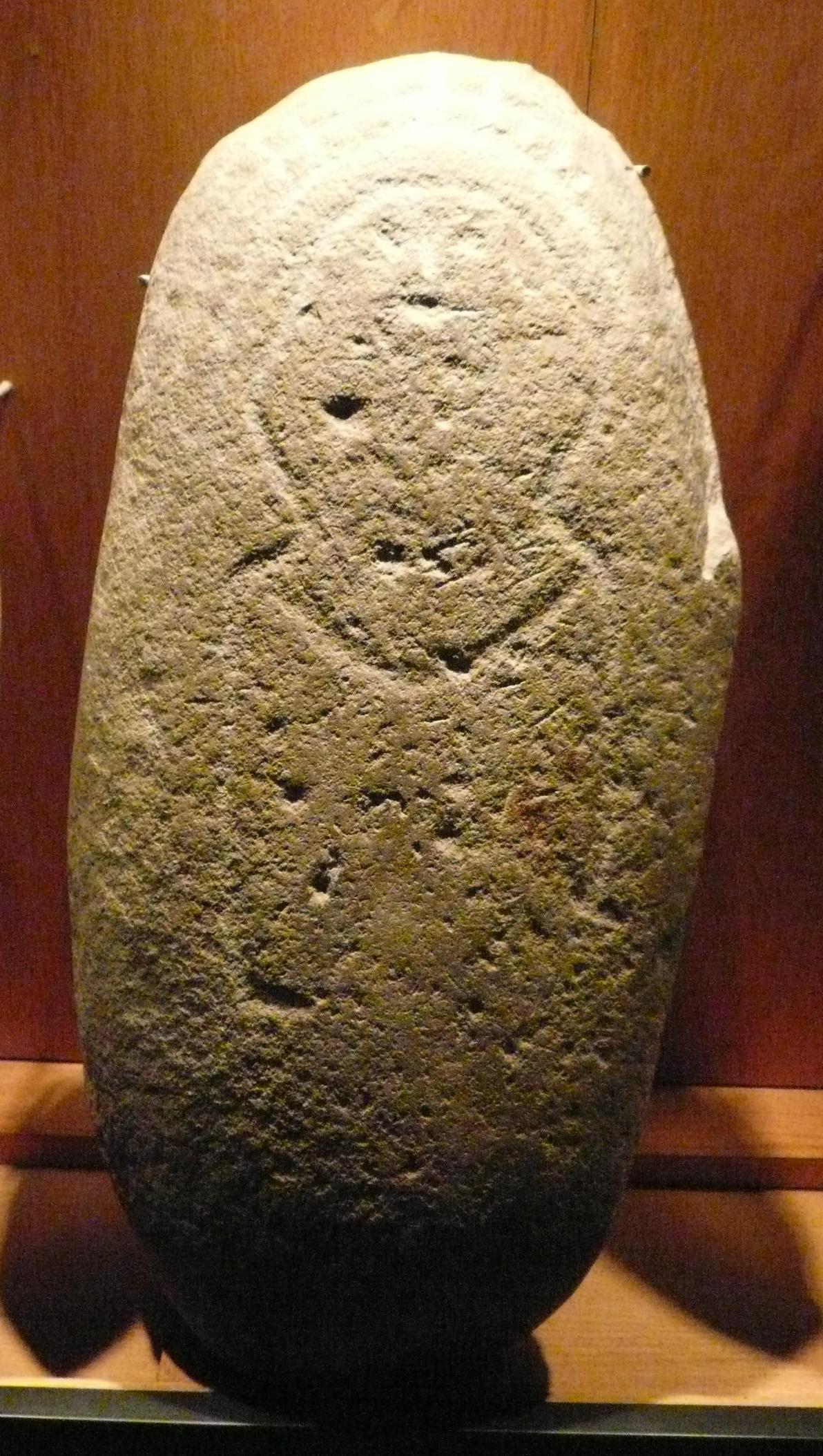 Cerezal (Hurdes) estela. Pizarra. Edad del Cobre - Bronce. III - II milenio aC. Antropomorfo con tocado, brazos, manos, pies y collares.